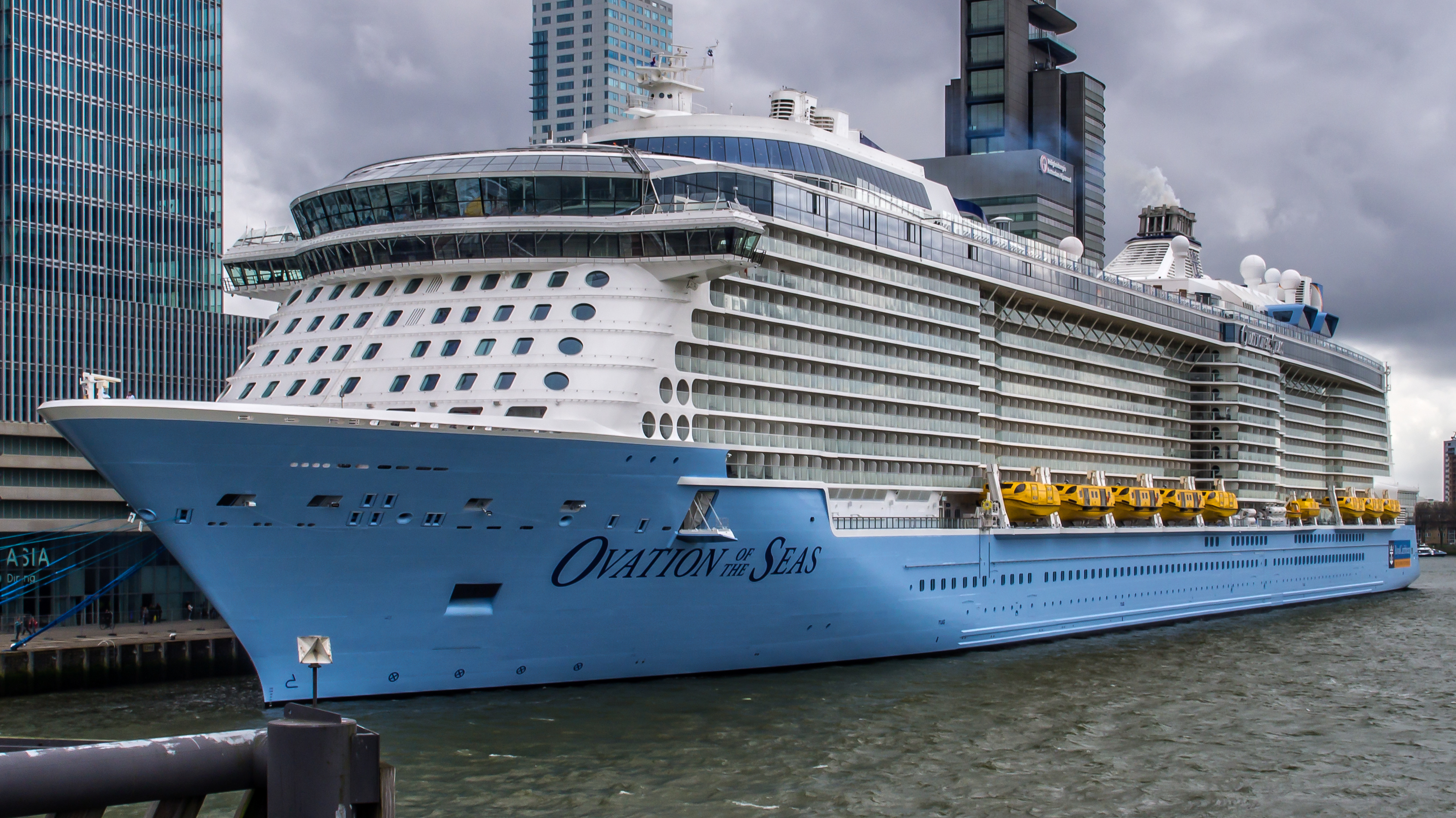 Op vrijdag 15 april 2016 arriveerde de Ovation of the Seas uit Southampton tijdens diens maidentrip om 10.00 uur aan de Wilhelminakade van de Cruiseport Rotterdam. Het schip is 347 meter lang en 41,4 meter breed en er kunnen maximaal 4905 passagiers aan boord.